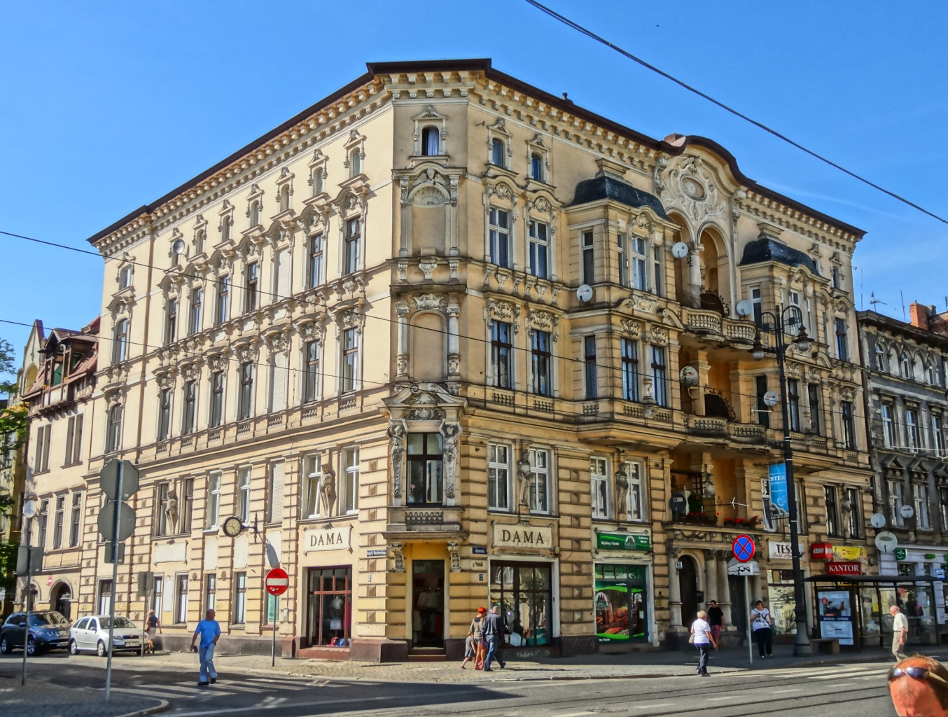 Kamienica przy ul. Gdańskiej 63 w Bydgoszczy - róg ul. Cieszkowskiego